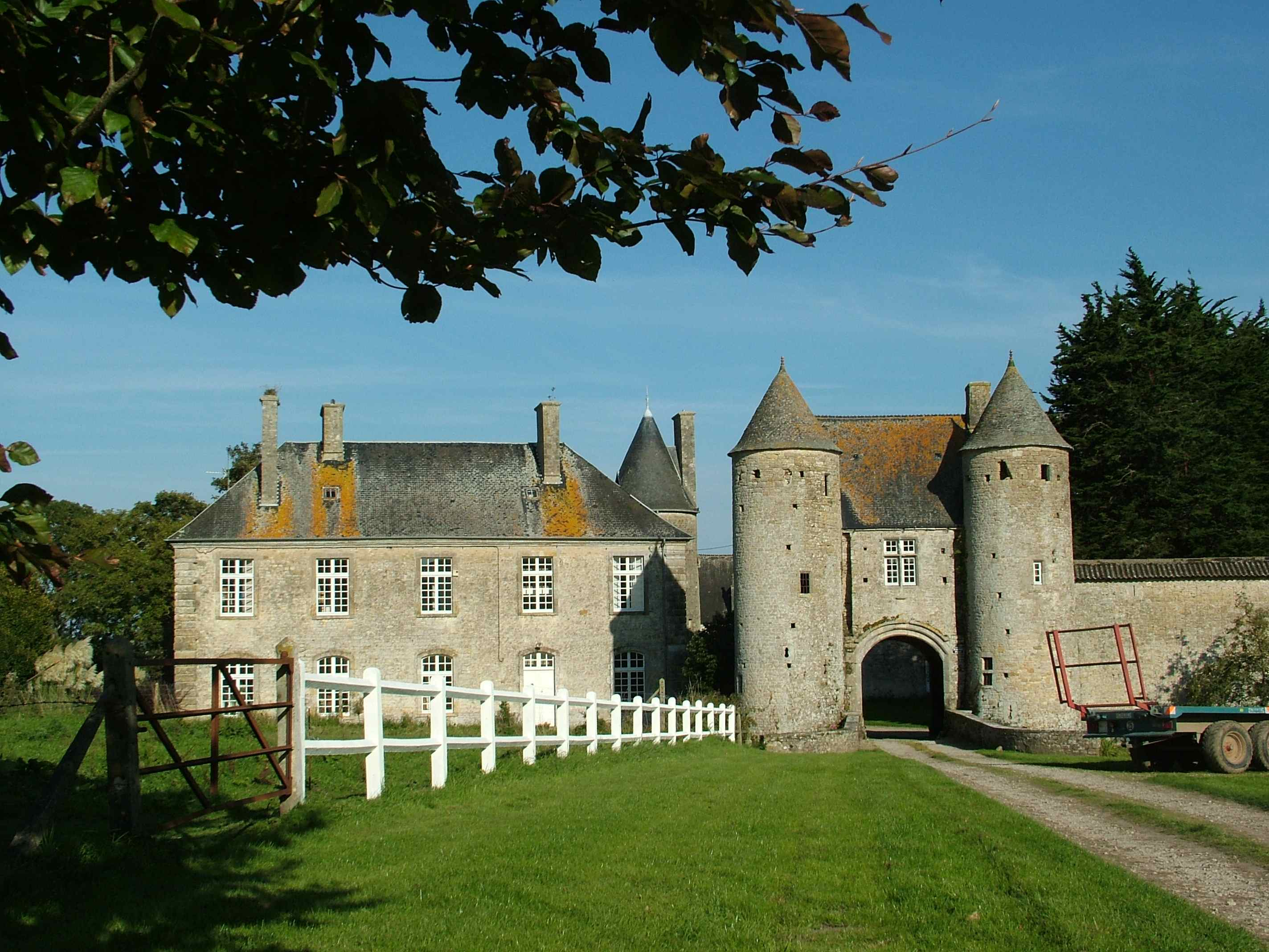 Château d'Amfreville.